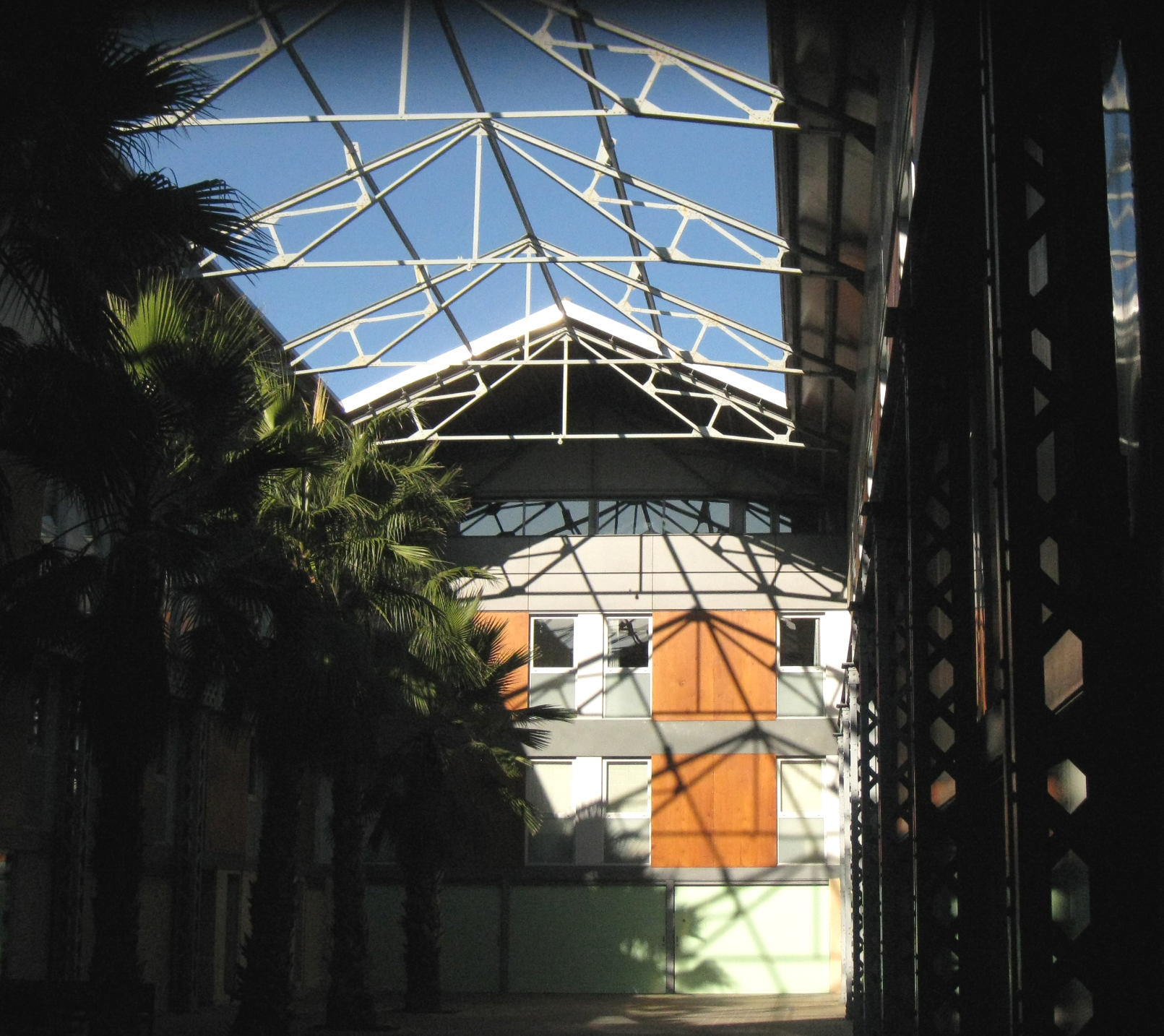 Fàbrica Gibert i Junyent (Terrassa)